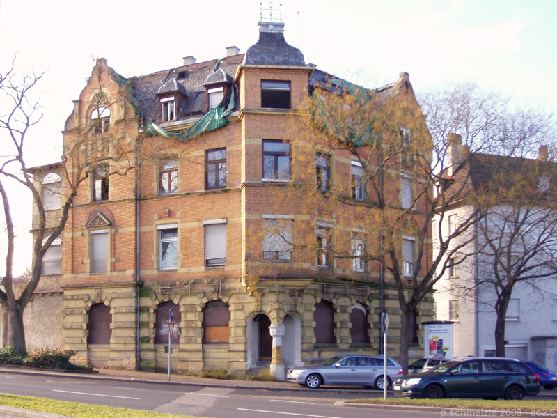 Gebäude Charlottenstr. 2 in Heilbronn